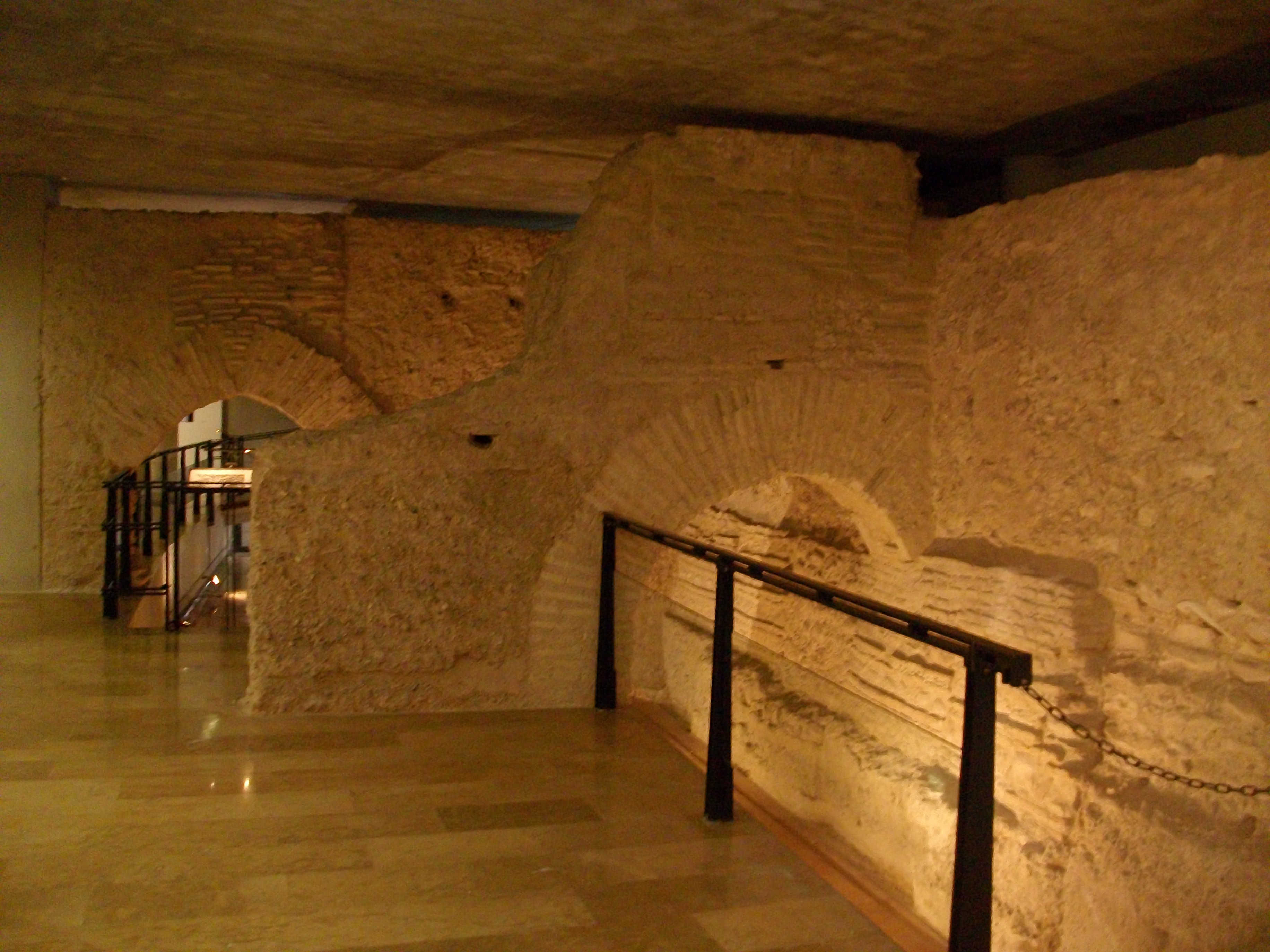 Arcs que sostenien la volta que cobria la séquia fillola de na Rovella, qua abastia diversoso tallers artesanals i servia de col·lector a la ciutat, tot aprofitant l'antic vall o fossat de la muralla islàmica. Restes visibles a la Galeria del Tossal.